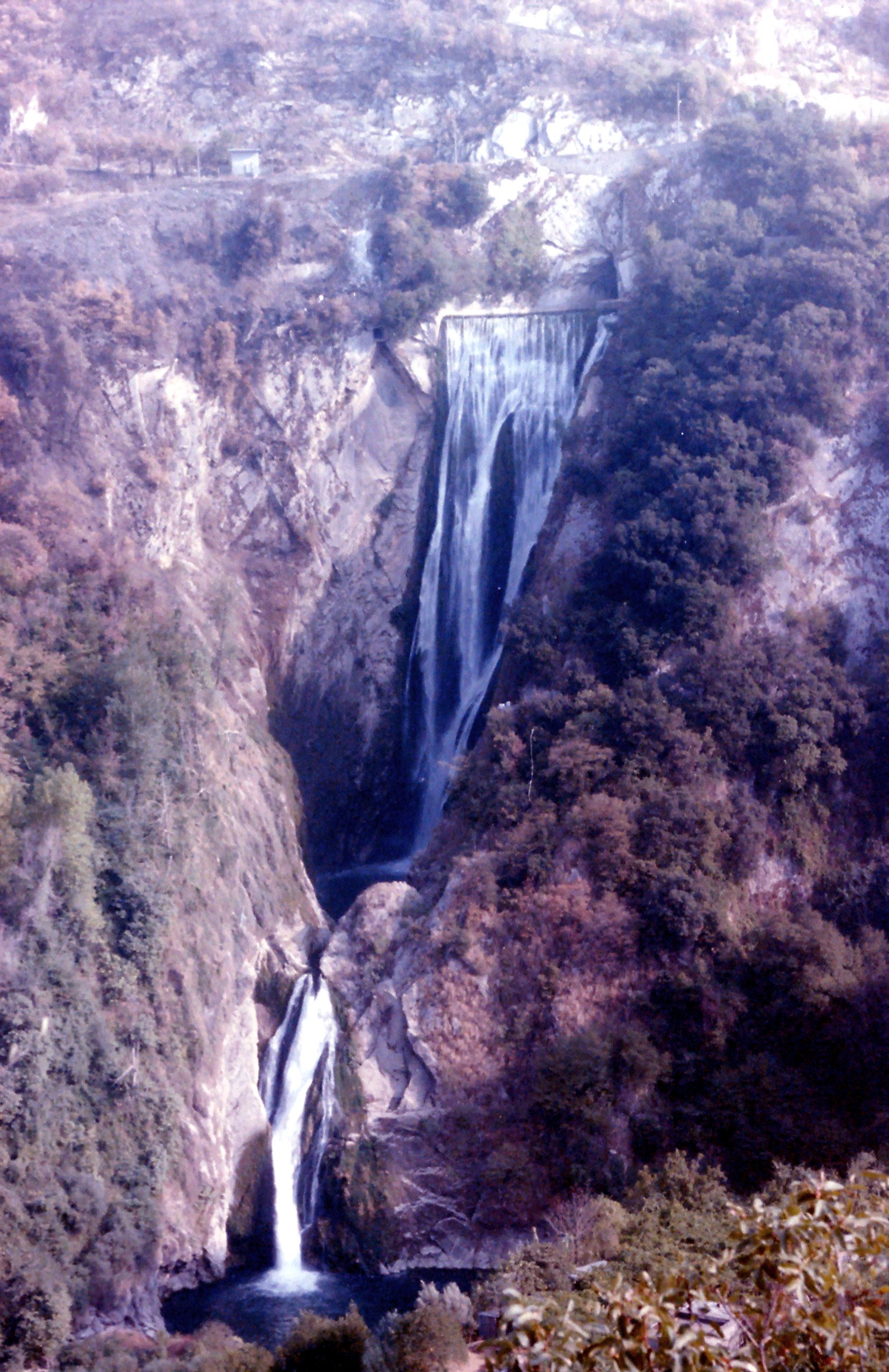 La cascata dell'Aniene a Villa Gregoriana di Tivoli